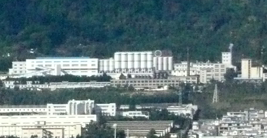 Dali Beer Brewery